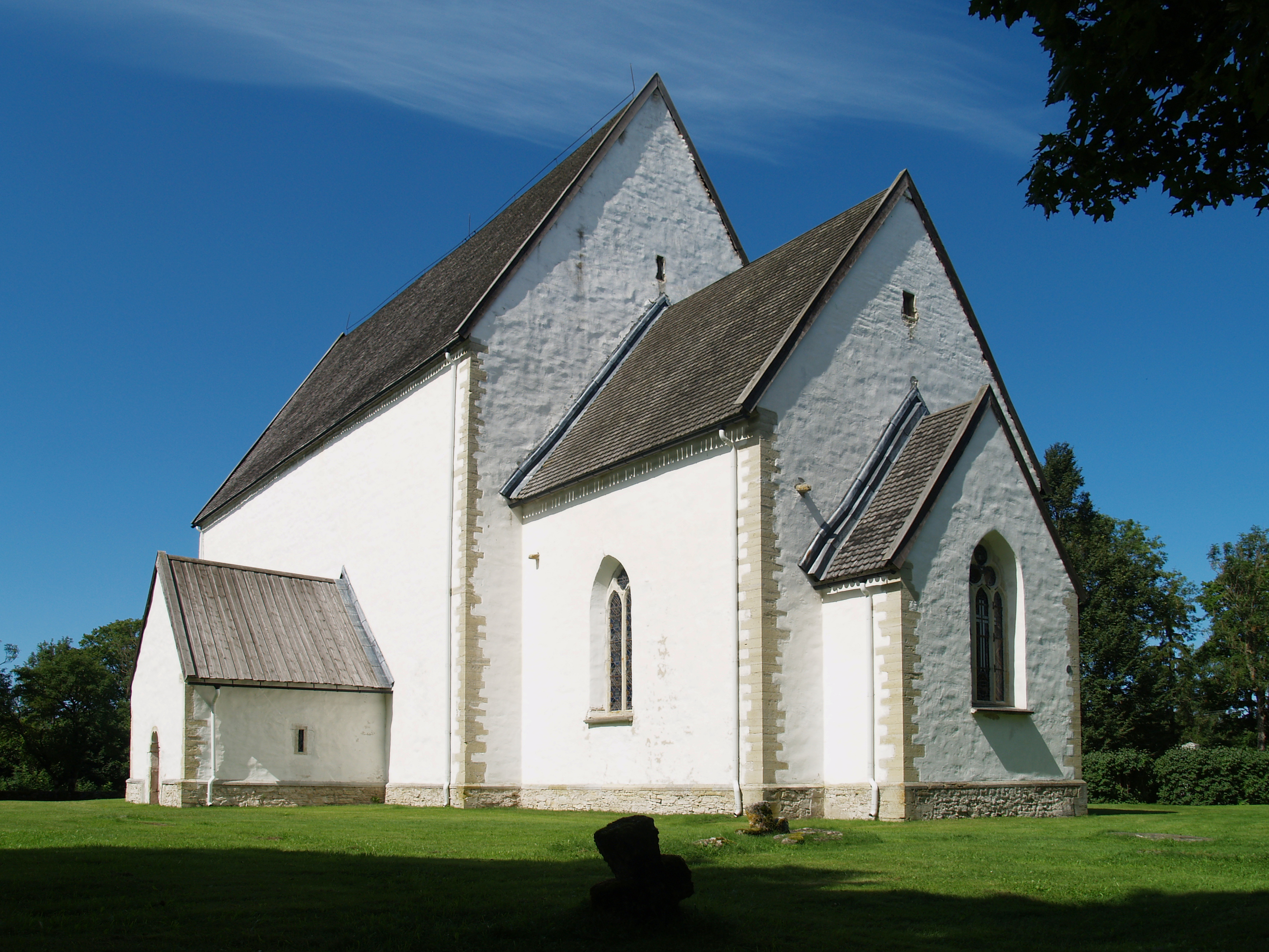 Muhu Katariina kirik